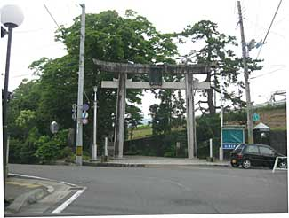 小田井懸神社鳥居